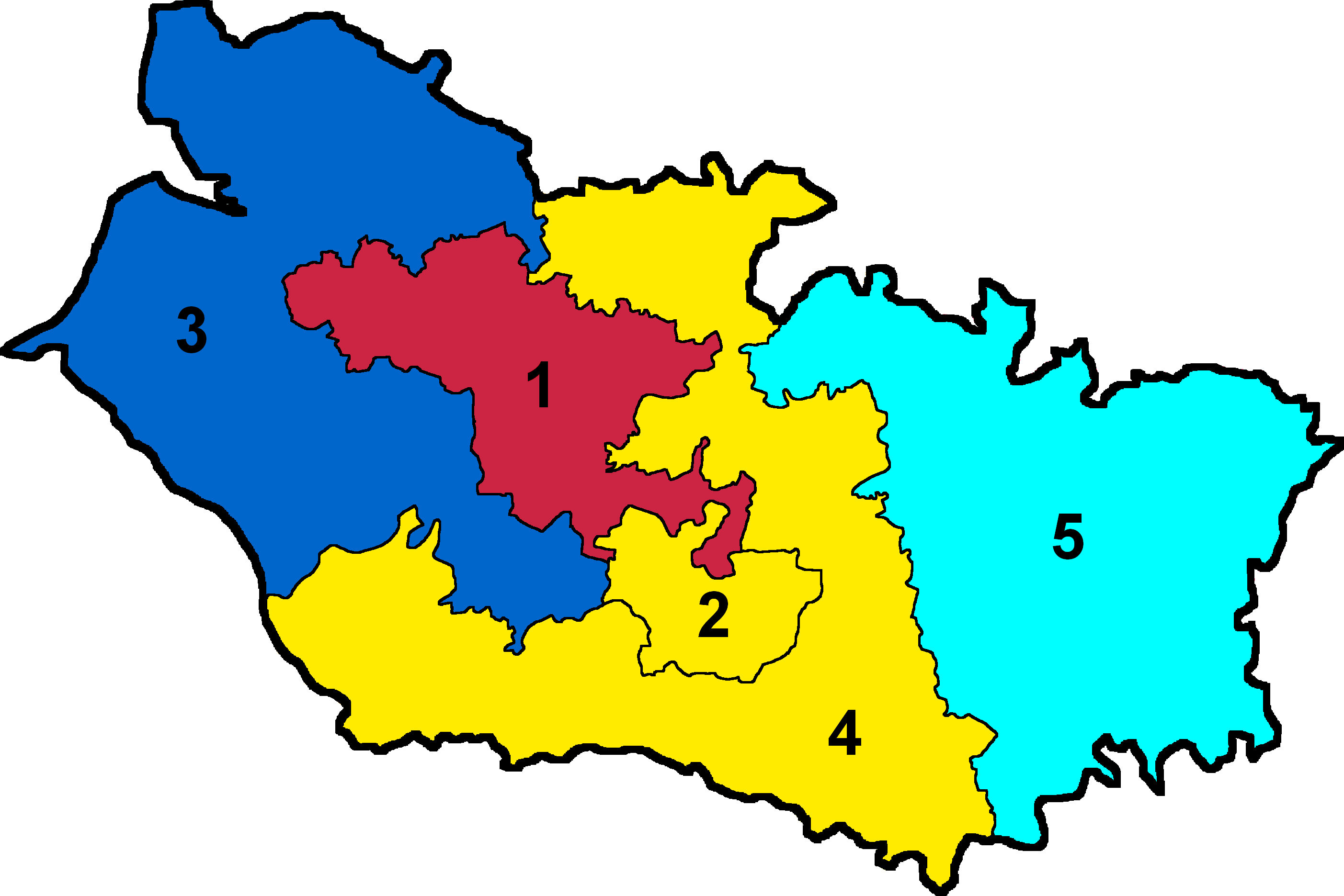 Députés de la Somme élus lors des élections législatives de 2017